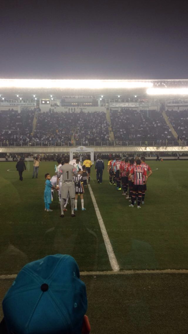 Entrada dos times no gramado do Estádio Urbano Caldeira para a partida Santos x São Paulo pelo Campeonato Brasileiro de 2015